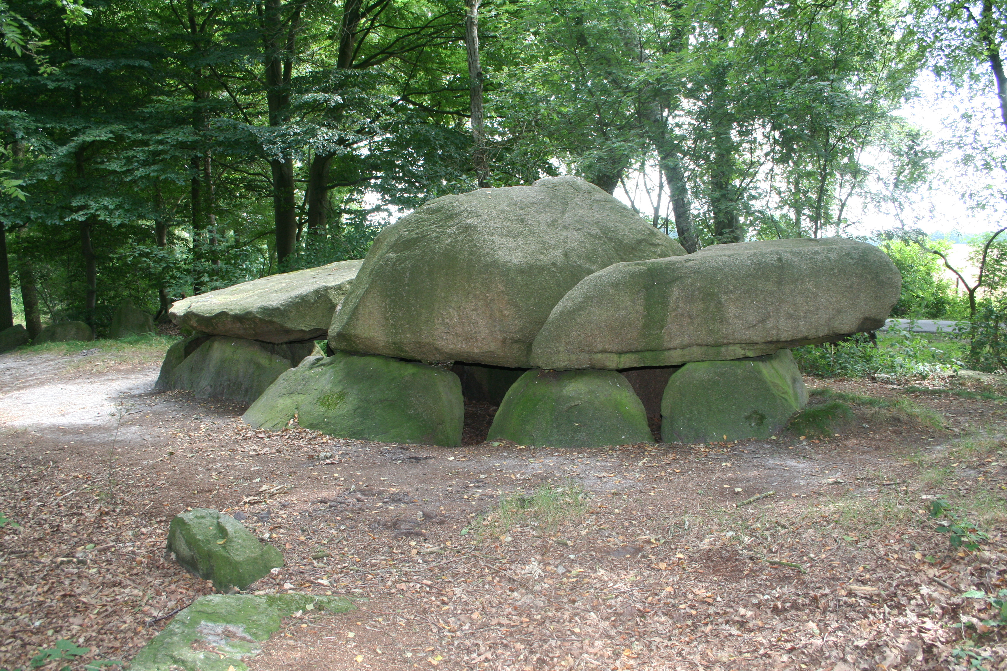 Teufelssteine Molbergen (Großsteingrab Bischofsbrück)